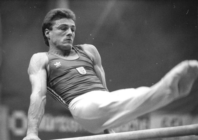 Berlin, Ralf Büchner ADN-Bernd-Settnik 15.12.90 Berlin: Turnen-Deutschland-Cup Der Potsdamer Ralf Büchner - hier am Barren - belegte im Zwölfkampf mit 114,30 Punkten hinter Andreas Wecker (SC Berlin-115,15) den zweiten Rang beim Deutschland-Pokal der Turner in der Saefkow-Halle. Insgesamt bestimmen die Aktiven aus der ehemaligen DDR deutlich das Geschehen und brachten neun Turner unter die besten zwölf. Abgebildete Personen: Büchner, Ralf: Turner, Olympiateilnehmer 1988, DDR